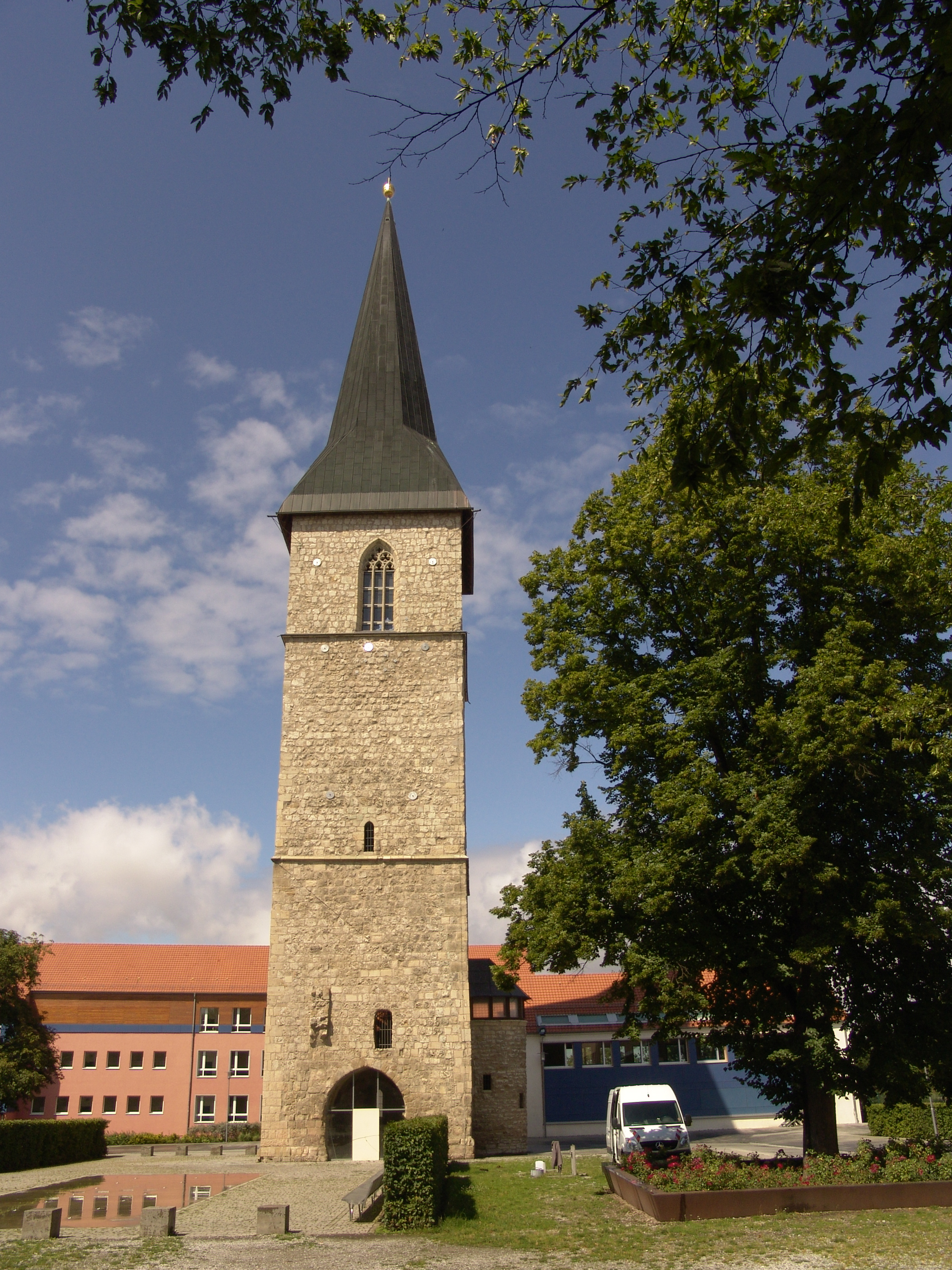 Nordhausen, St. Petrikirchturm